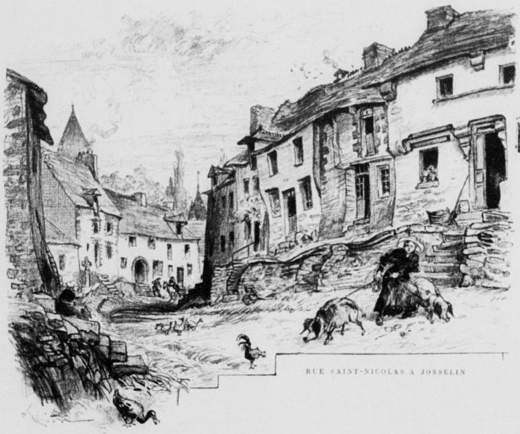 Josselin : la rue Saint-Nicolas vers 1900 (lithographie d'Albert Robida publiée dans "La vieille France, Bretagne" vers 1900)